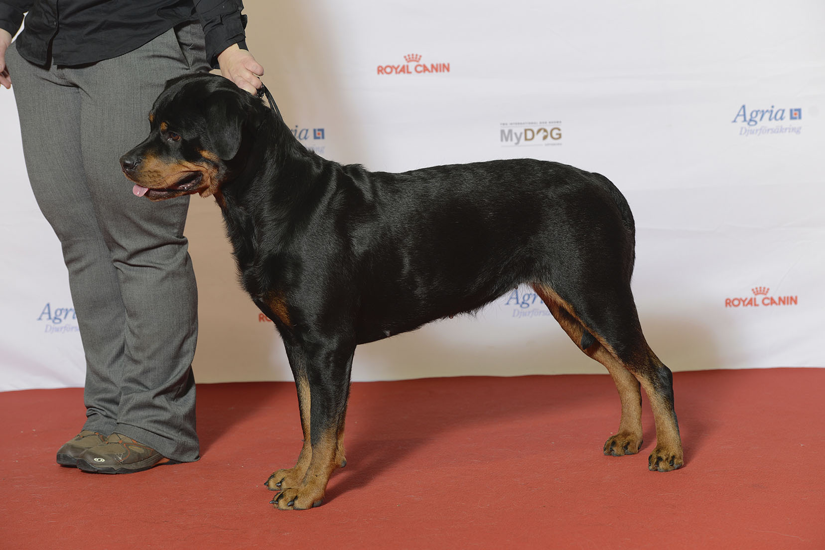 Grupp 2 ROTTWEILER, ASKELONS IDUN MyDOG, Nordens största hundevenemang